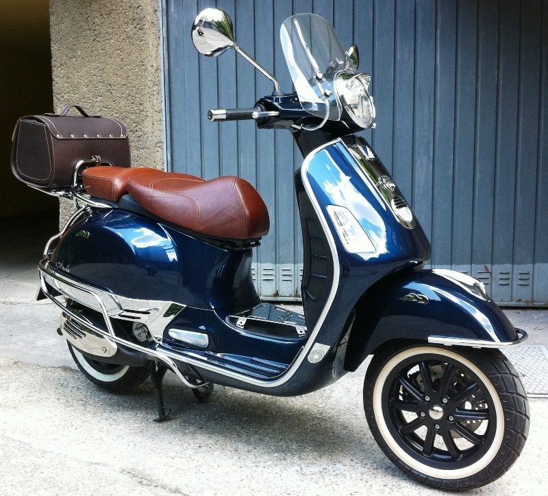 Vespa GTS 250 i.e.